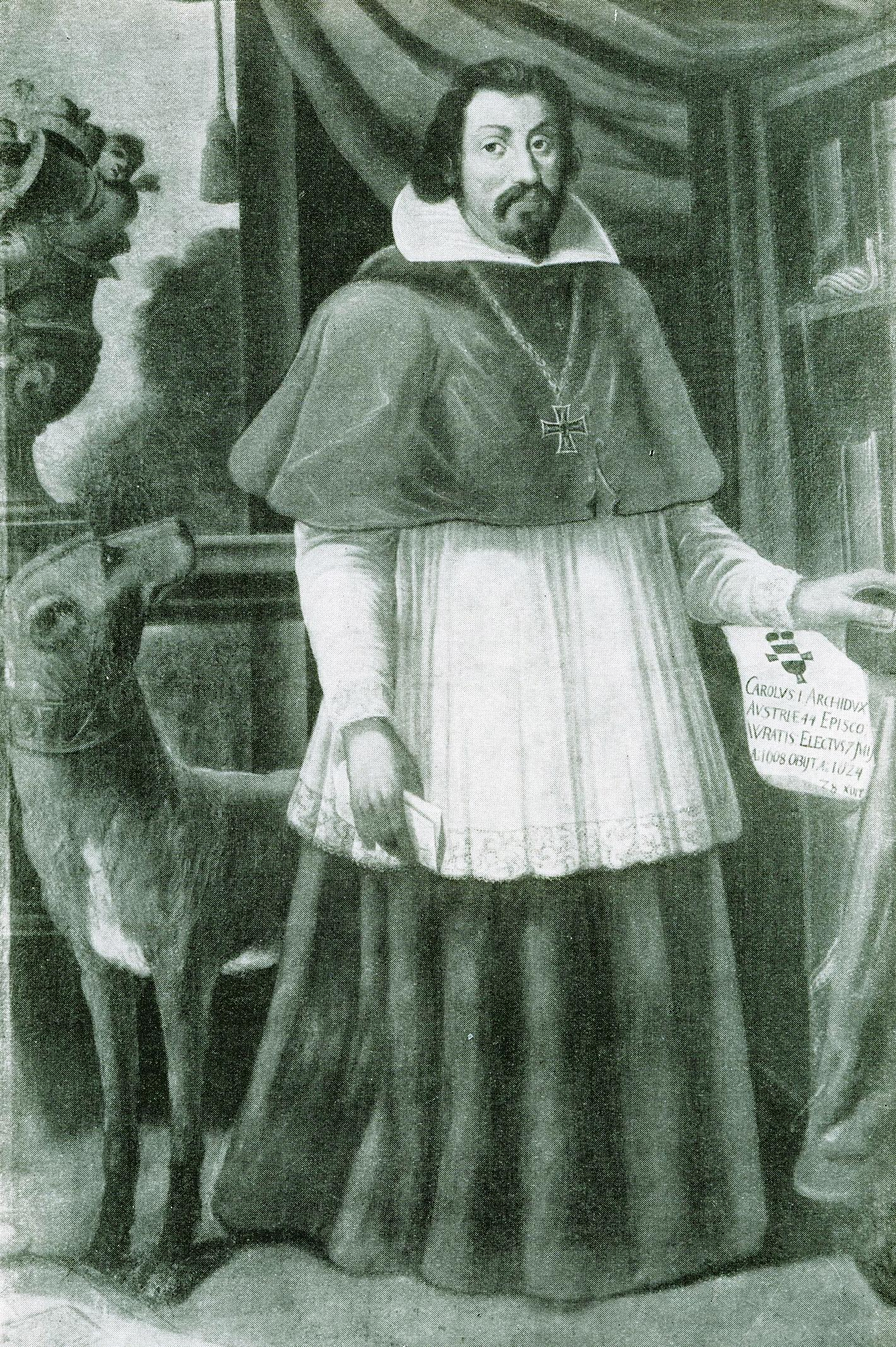 Portrait des Breslauer Bischofs Erzherzog Karl von Innerösterreich